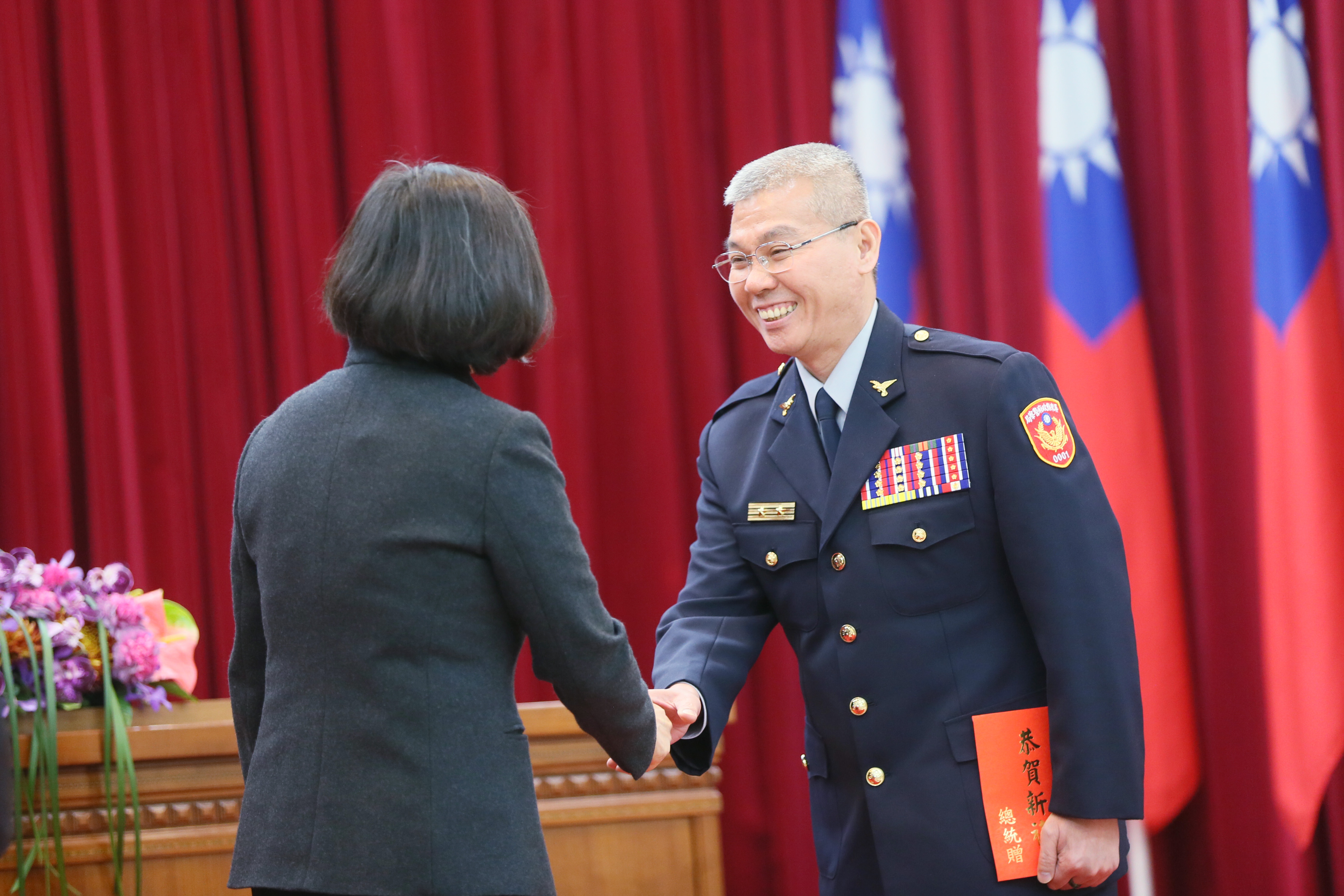 中文（台灣）: 中華民國總統蔡英文出席內政部警政署「106年第一次署務會議」，並頒發新春紅包予屏東縣政府警察局。